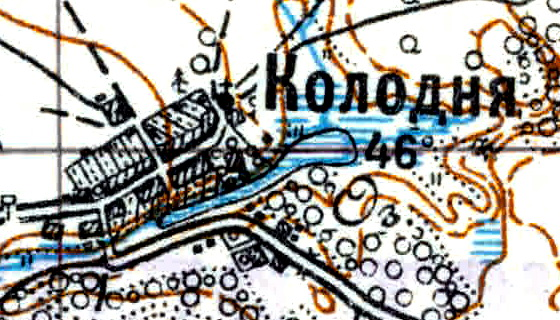 Топографическая карта Ленинградской области, квадрат Vc-29 (Батецкая), деревня Колодно